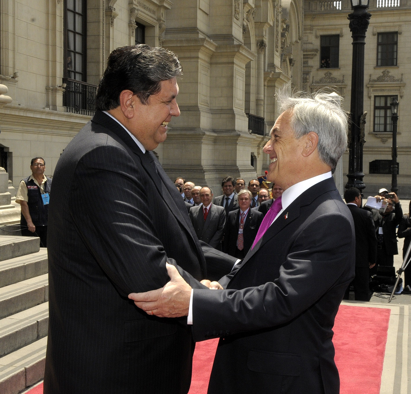 El Presidente de la República, Sebastián Piñera, es recibido en el Palacio de Gobierno por el Presidente del Perú, Alan García, lugar donde sostuvieron una reunión de trabajo.